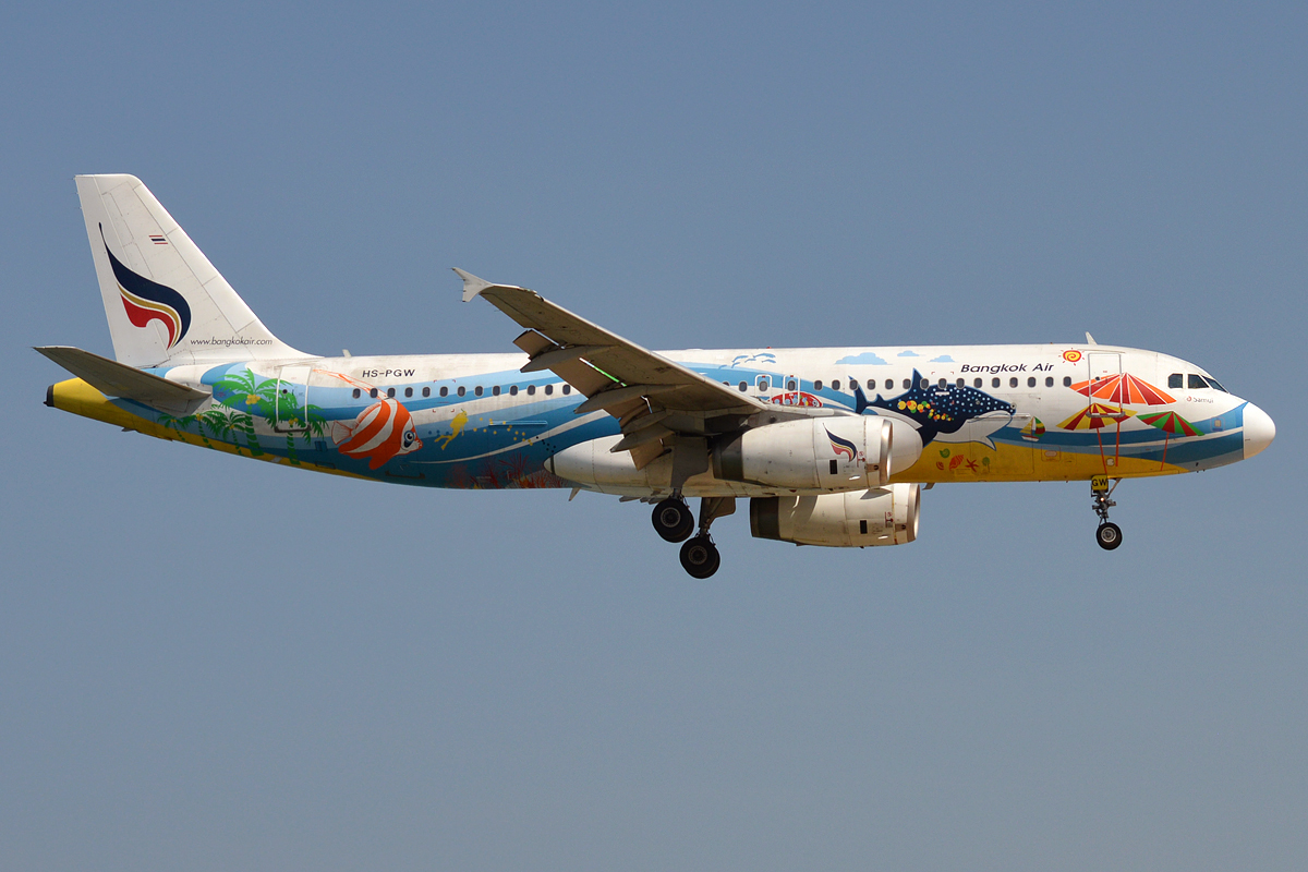 Bangkok Airways (Samui livery), HS-PGW, Airbus A320-232